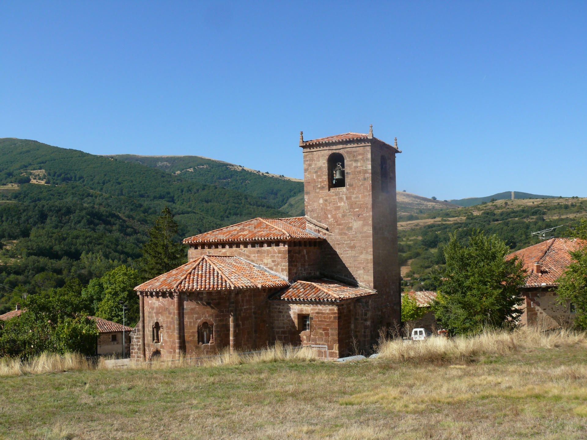 Iglesia de San Sebastián